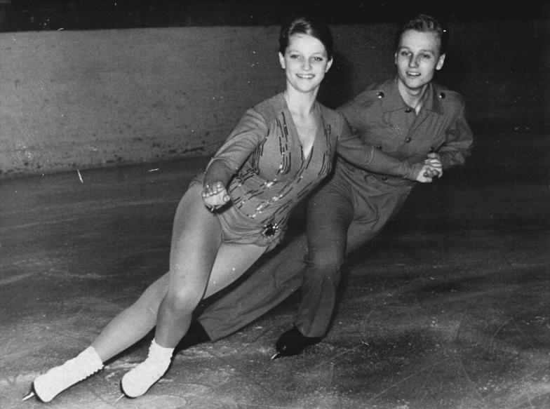 Eva Romanova, Pawel Roman Zentralbild Kohls Sta-Krz. 18.11.1962 Eiskunstlaufveranstaltung in der Werner-Seelenbinder-Halle Ein großes Schaulaufen, an dem sich viele bekannte Eiskunstläufer und -tänzer aus der Sowjetunion, Österreich, der CSSR, Ungarn und der DDR beteiligten, fand am 18.11.62 in der Berliner Werner-Seelenbinder-Halle statt. UBz: Die Europameister im Eistanz, Eva Romanova und Pawel Roman.